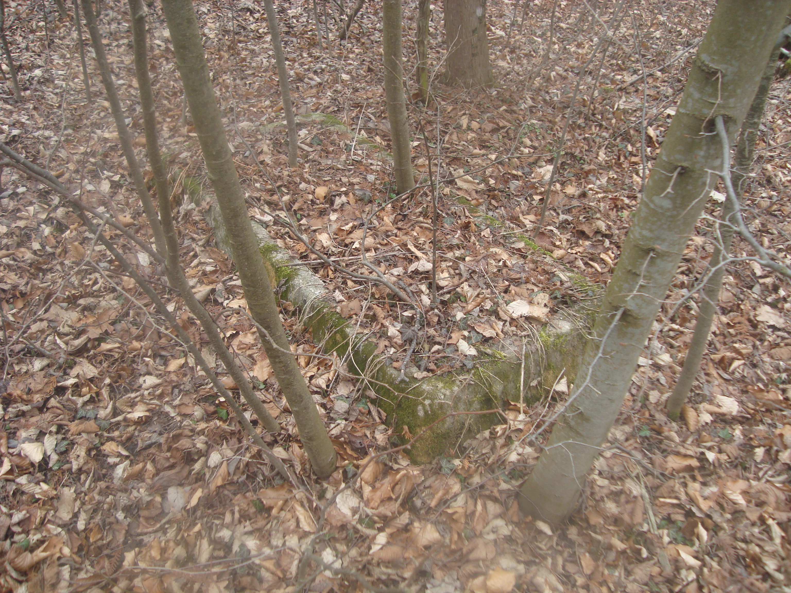 Grób na XIX-XX-wiecznym cmentarzu ewangelickim w Rogowie (powiat elbląski).